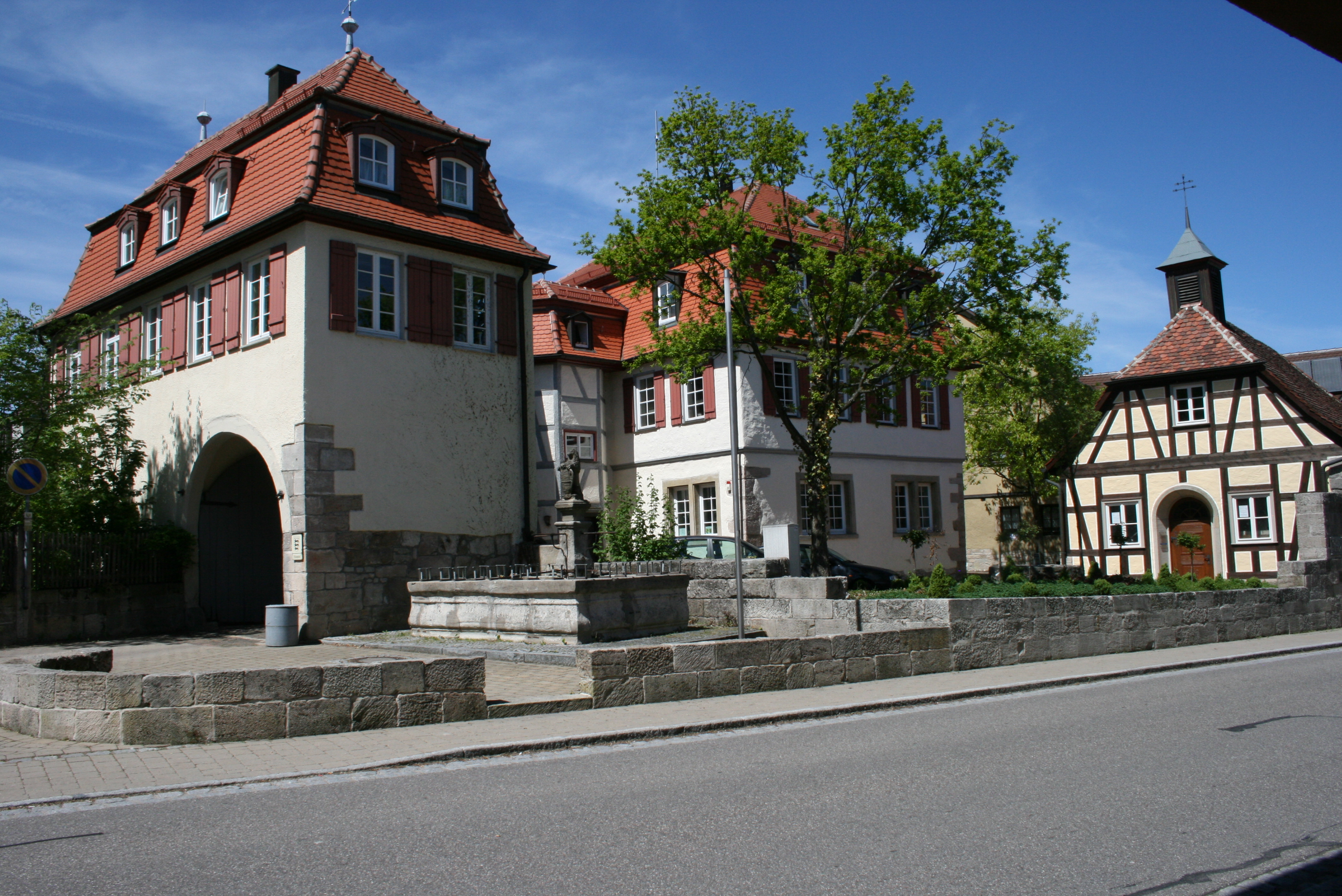 Das Schlössle in Mainhardt, von Südosten gesehen